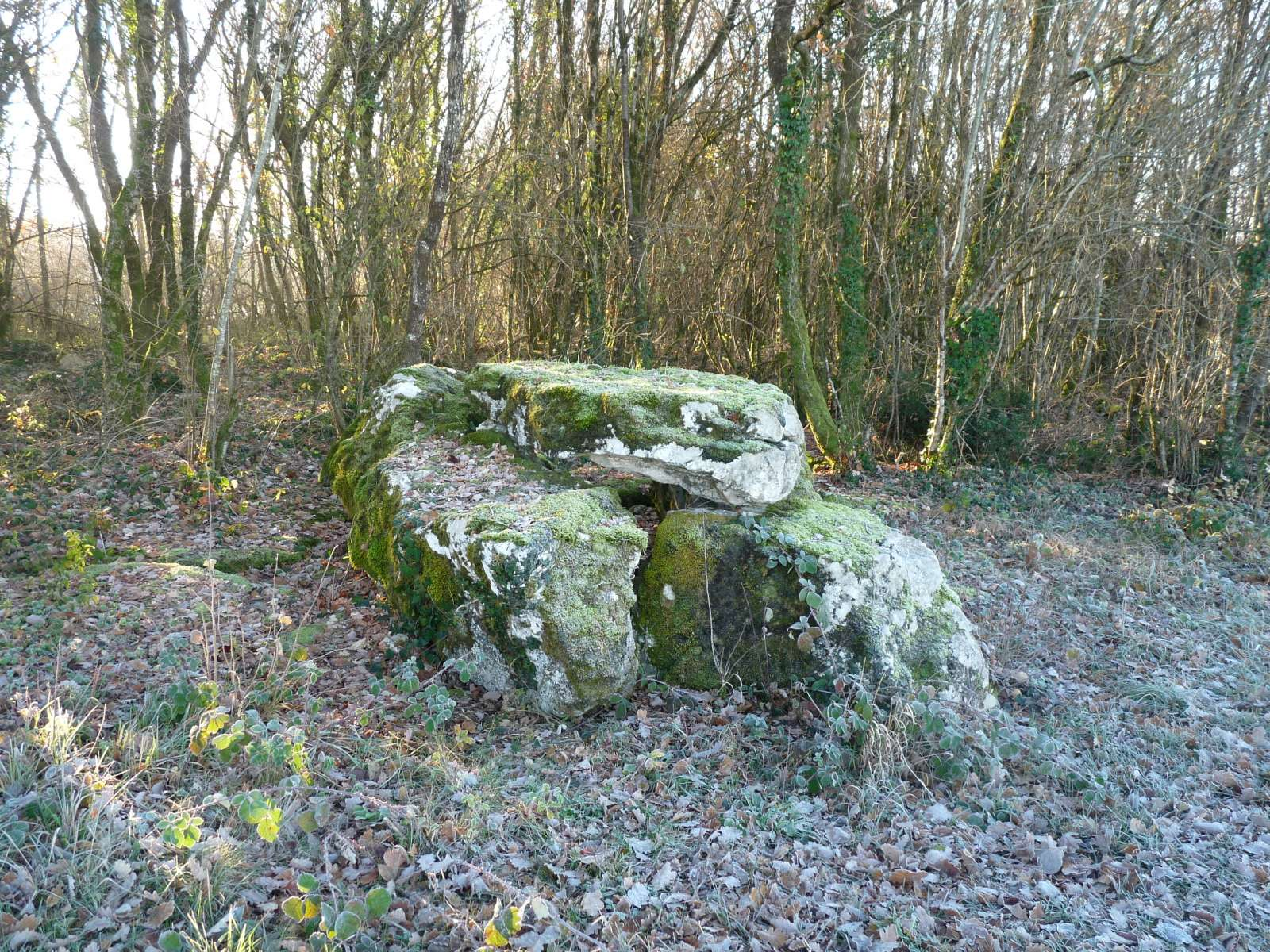 dolmen de St-Ciers-sur-Bonnieure, Charente, France